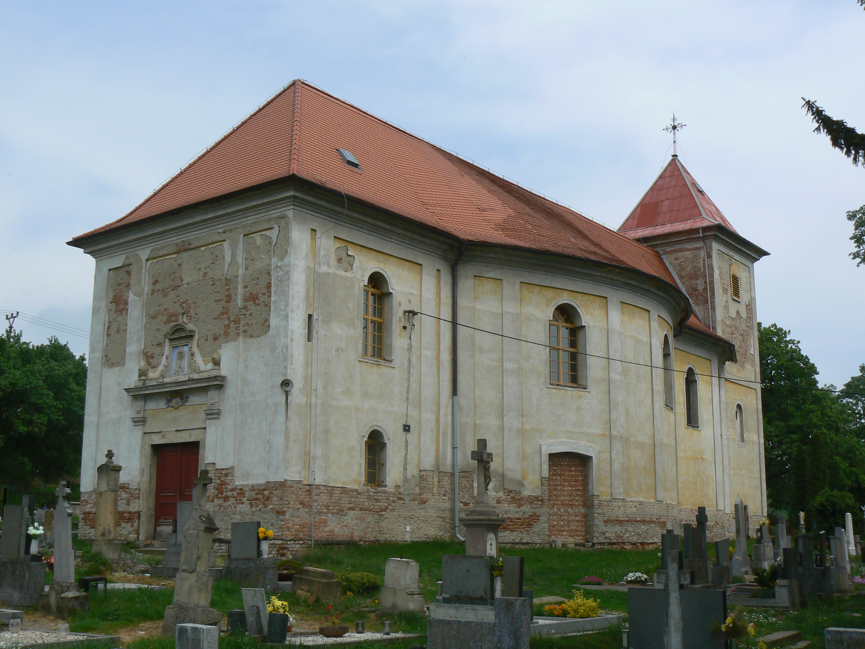 Farní kostel svatého Václava v Nemoticích, okres Vyškov.